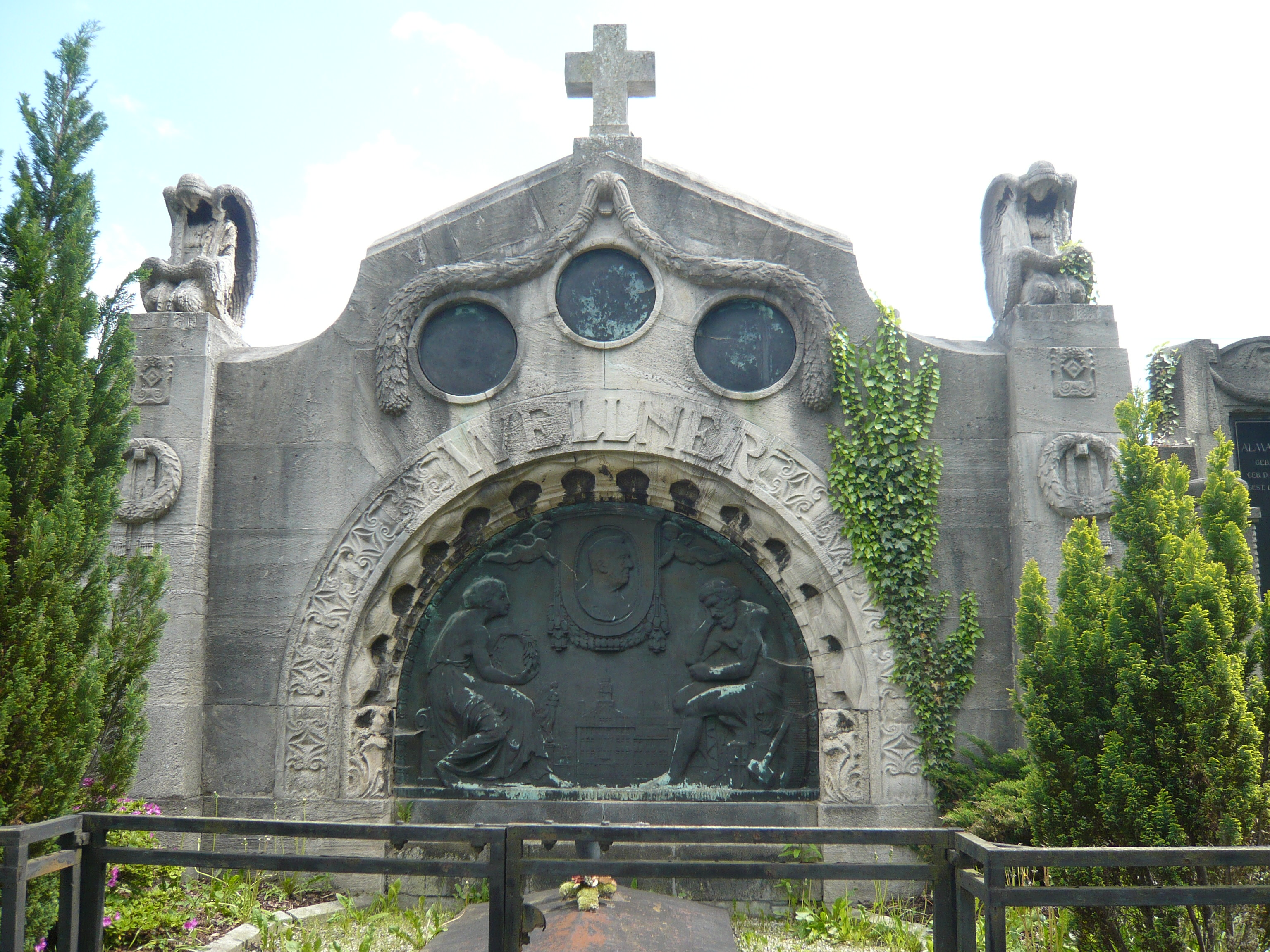 Stadt Aue, Grabmal Wellner auf dem Friedhof